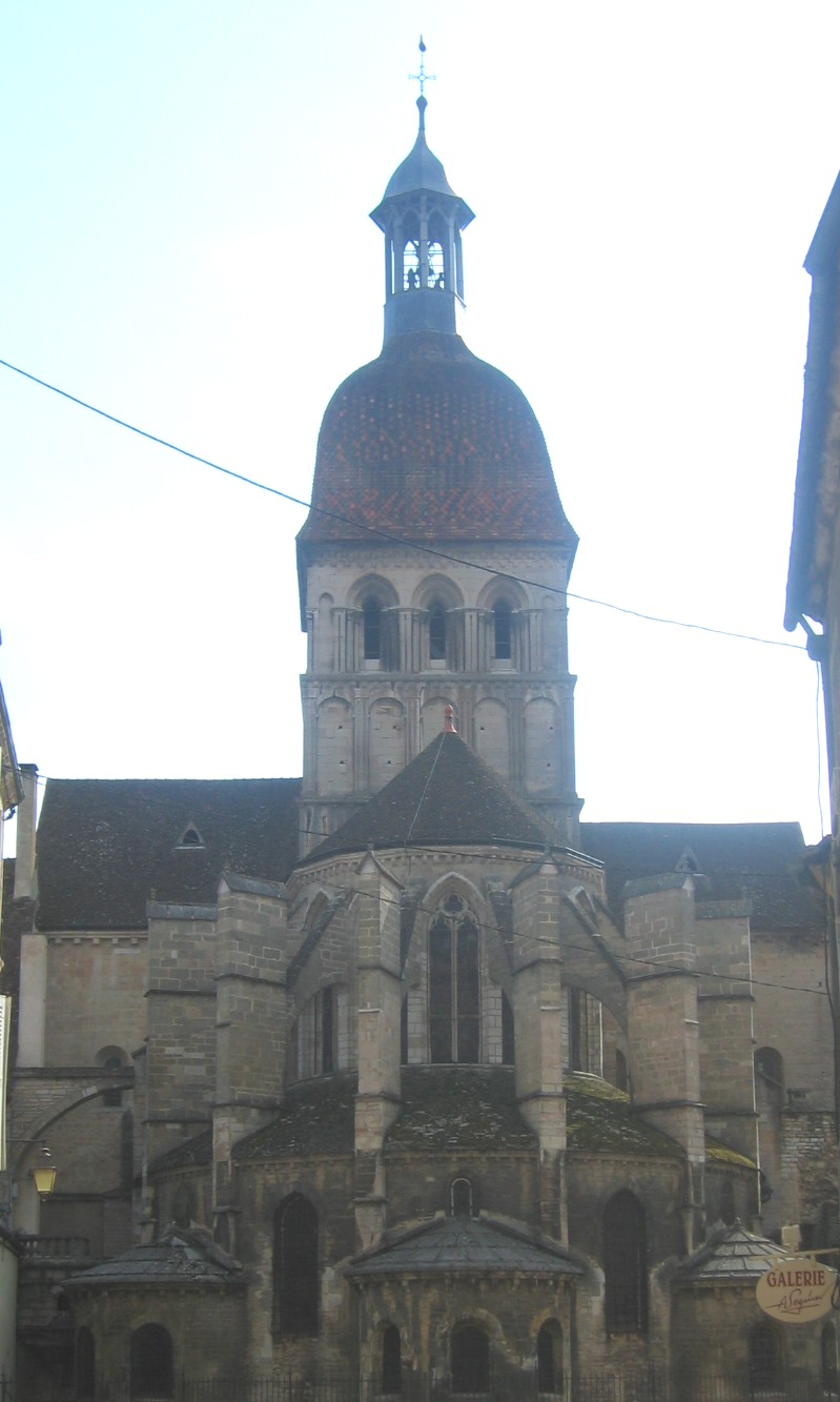 Collégiale Notre-Dame de Beaune, Bourgogne, France. Chevet